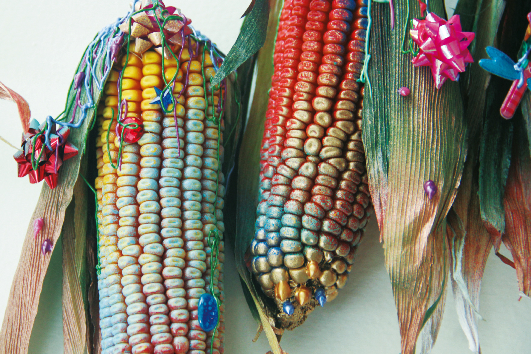 Los duendes del campo decoraron el patrimonio durante la noche (2013), Marcelo Pombo